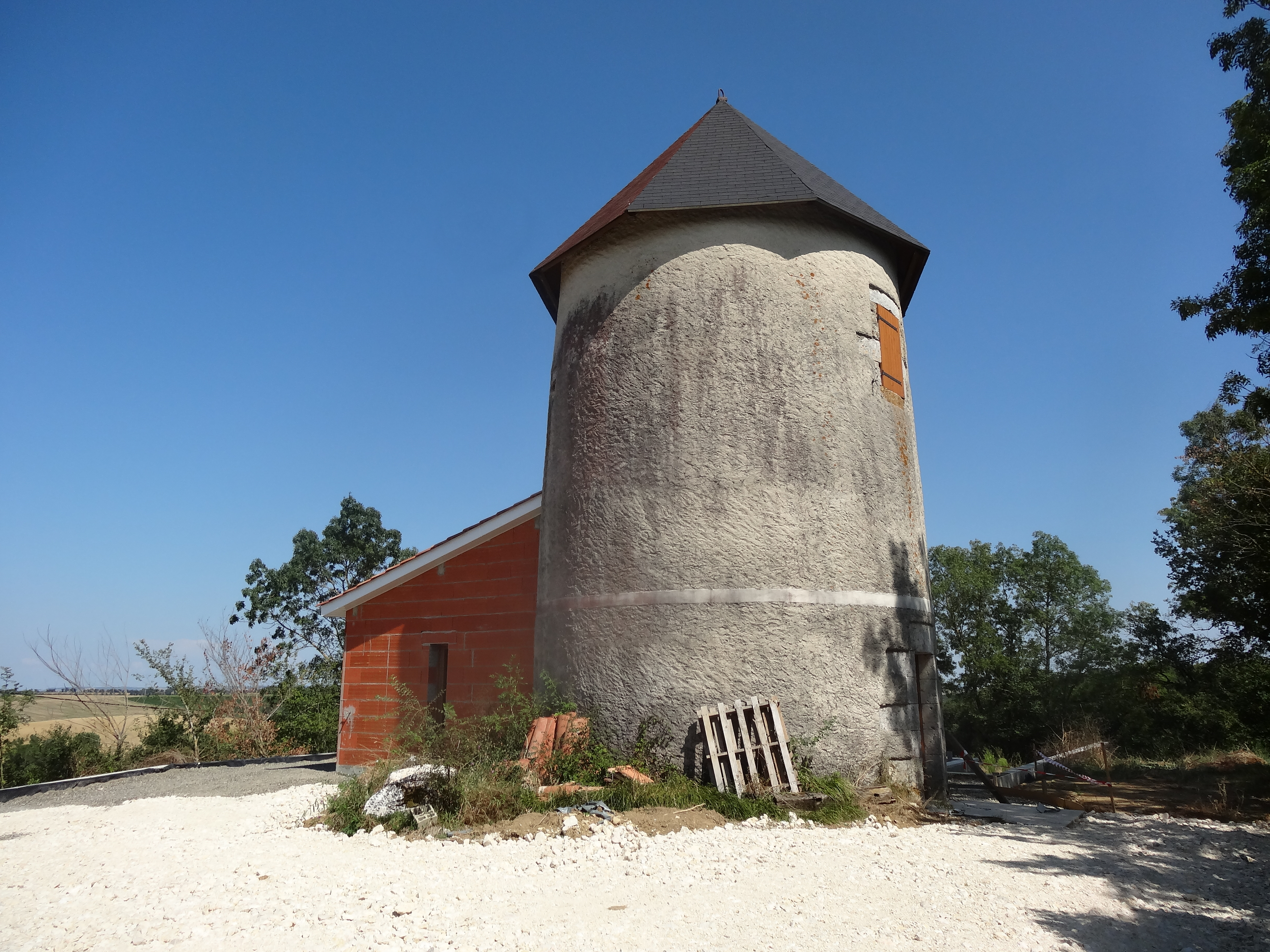 Moulin à vent 18e à Saint-Antonin.